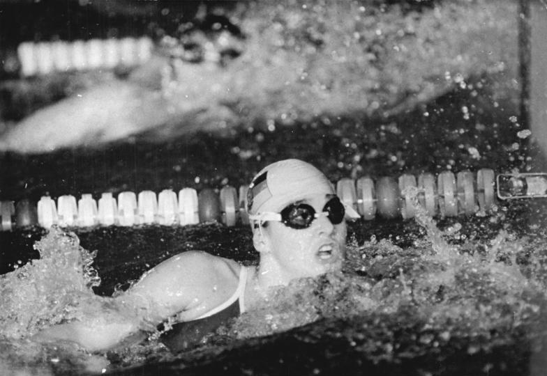 Katrin Meißner ADN-ZB Oberst 21.12.88 Potsdam: DDR-Wintermeisterschaften im Schwimmen- Den Meistertitel über 100-m-Freistil erkämpfte sich die Olympiasmedaillengewinnerin von Soul Katrin Meißner (SC Dynamo Berlin) in 55,49 s. (Foto vom Sprintpokal Dezember 1988)